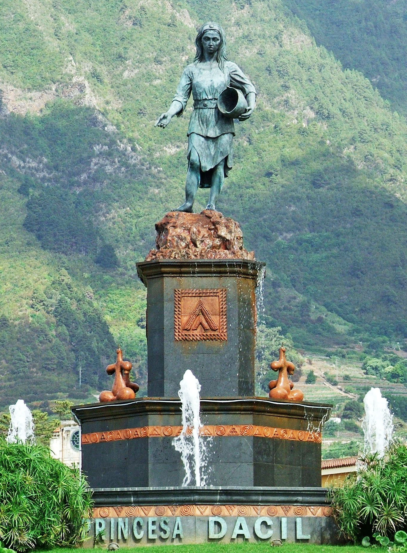 Fuente de la Princesa Dácil situada en la vía de entrada a La Orotava por El Ramal / Estatua creada por los artistas Ezequiel de León Cruz y Cristo Quintero / La princesa Dácil era hija de Bencomo, mencey de Taoro